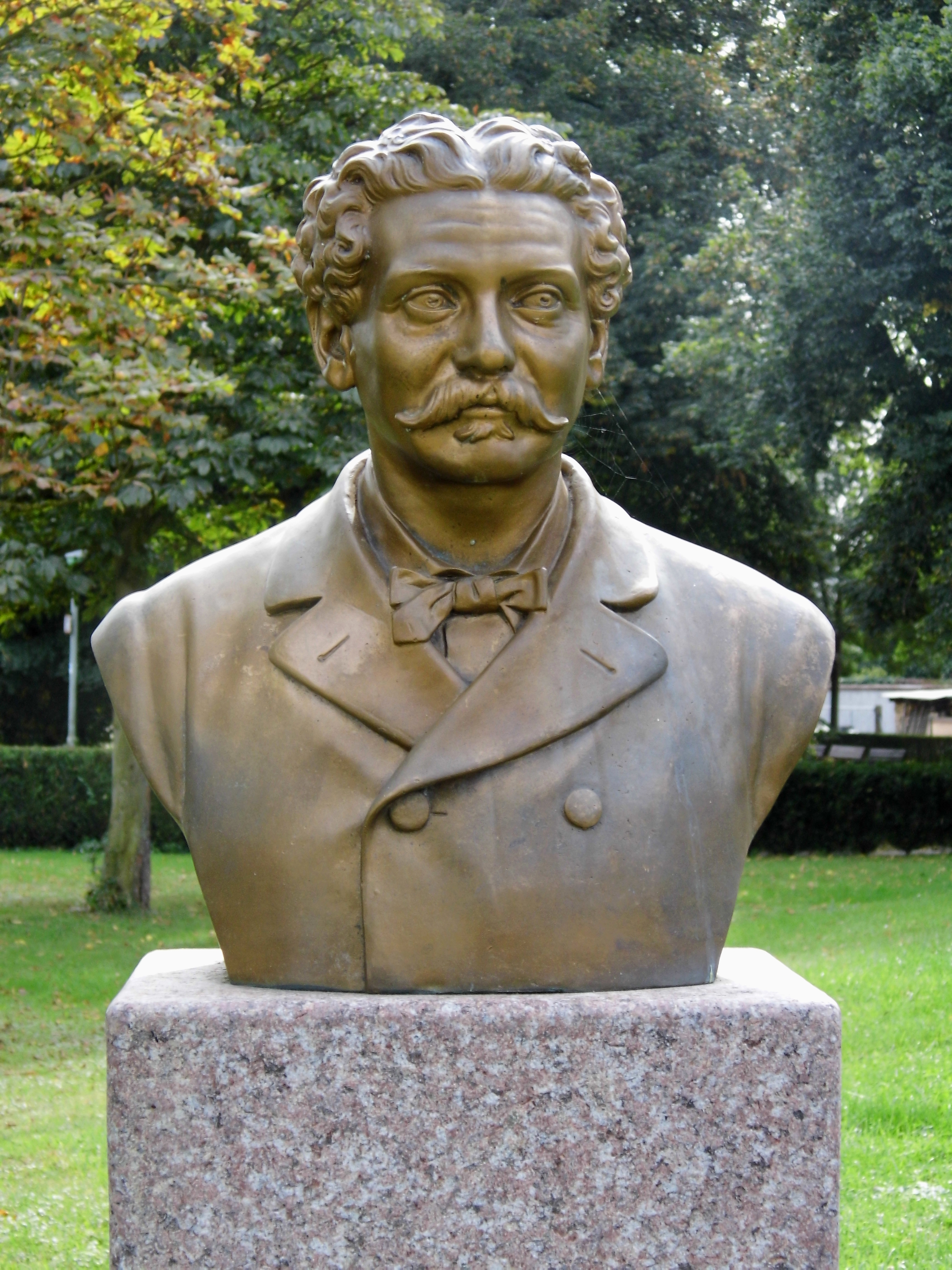 Harheim, Bockenheimerdenkmal